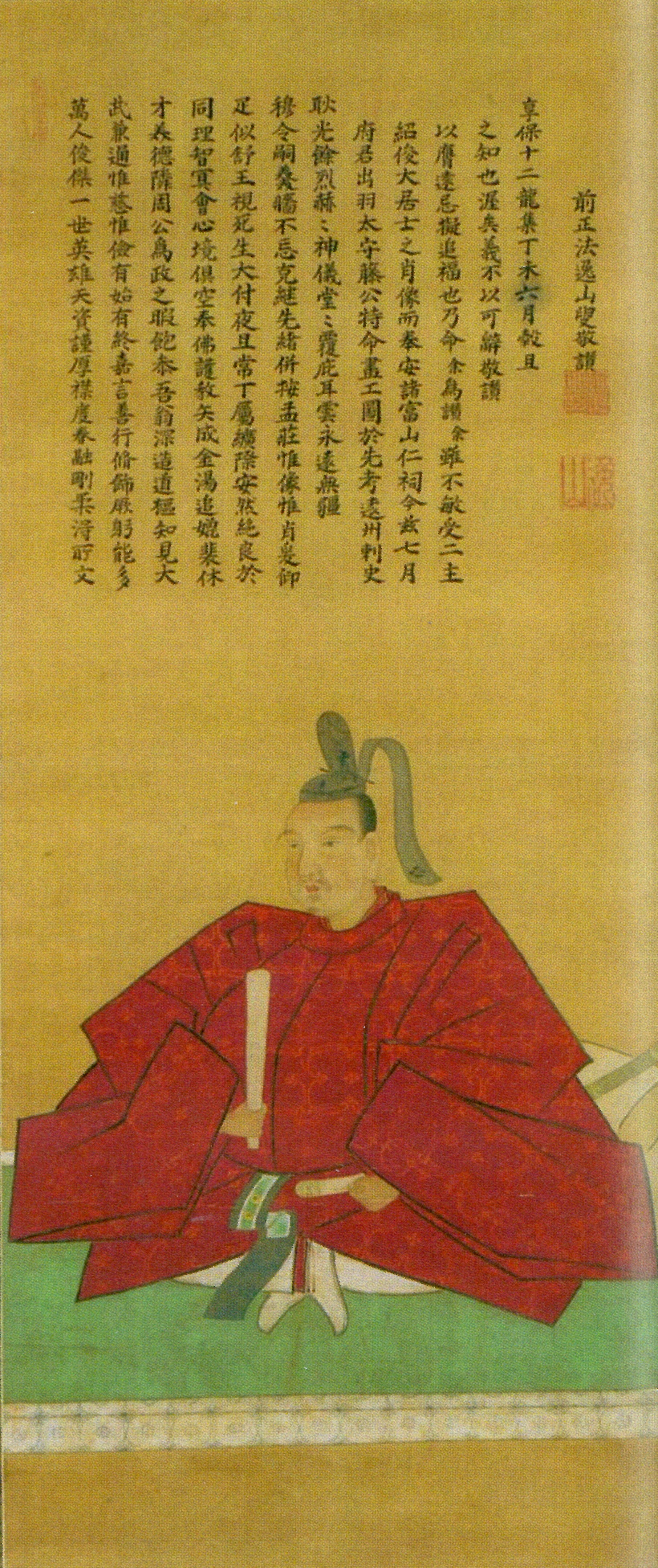 加藤泰恒の肖像。